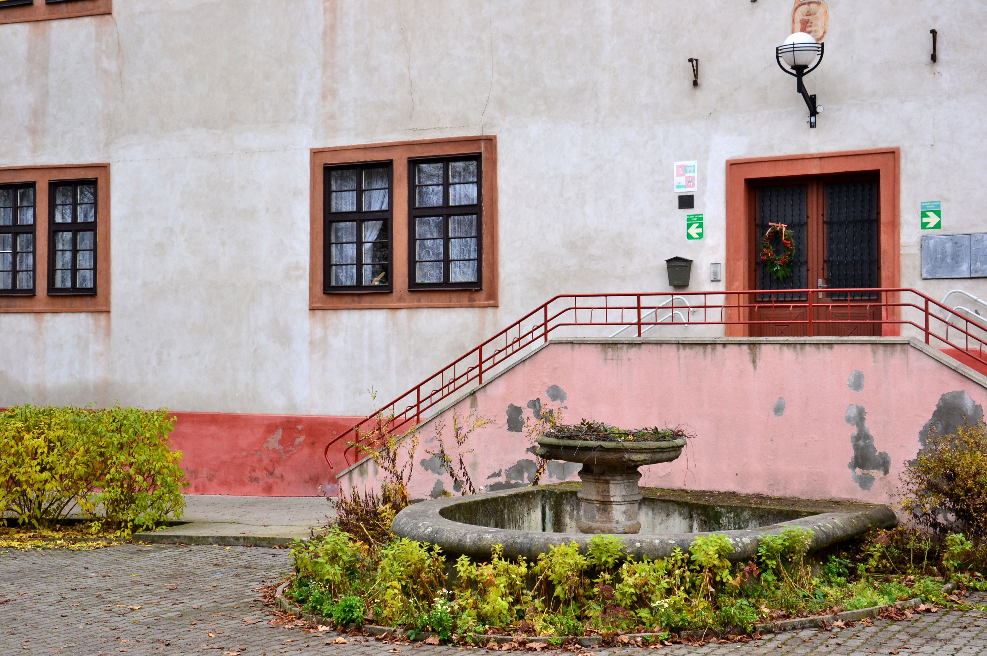 Mašťov .